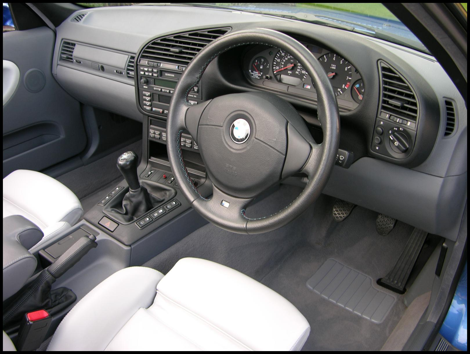 BMW M3 Evo E36 Convertible